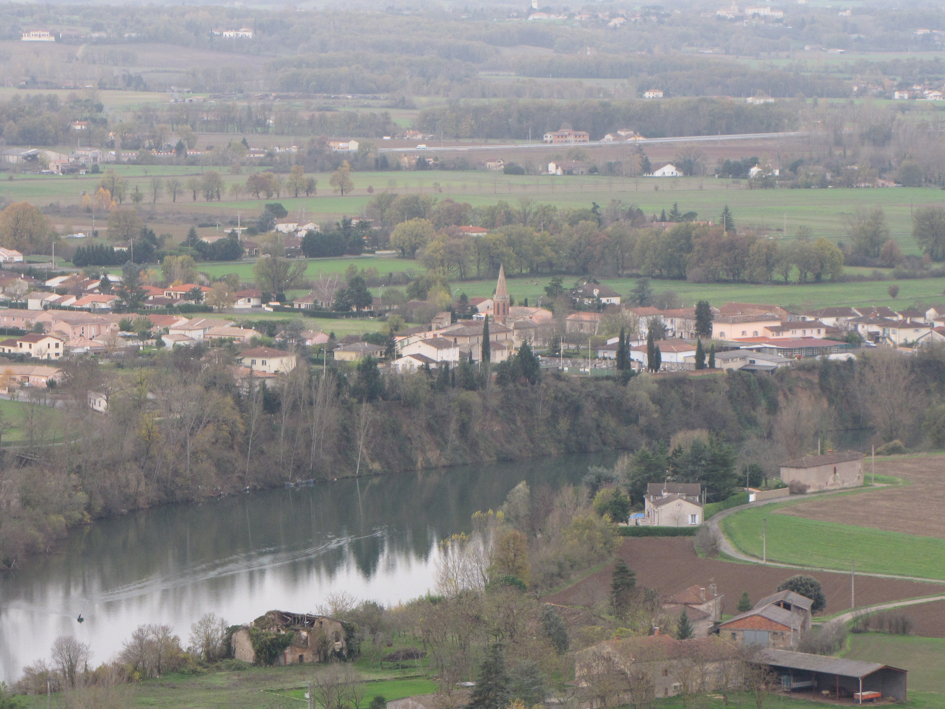 Terssac